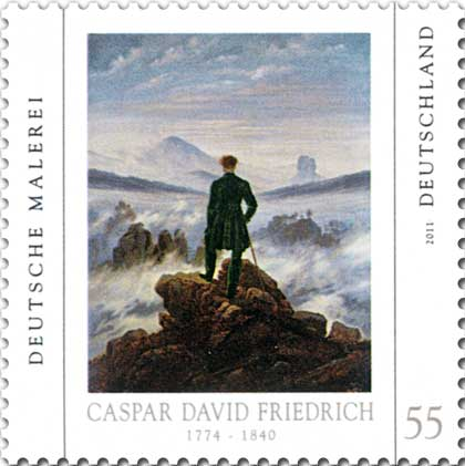 Serie "Deutsche Malerei", Caspar David Friedrich: "Der Wanderer über dem Nebelmeer"